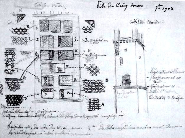 Reconstitution du décor de la pile. Dessin non signé daté de 1903